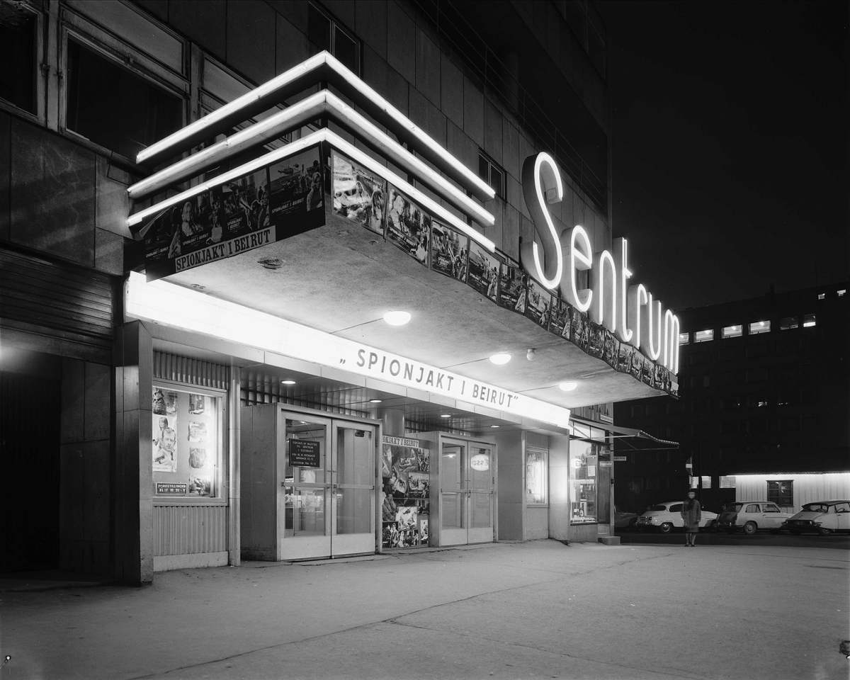 Sentrum kino, fasade